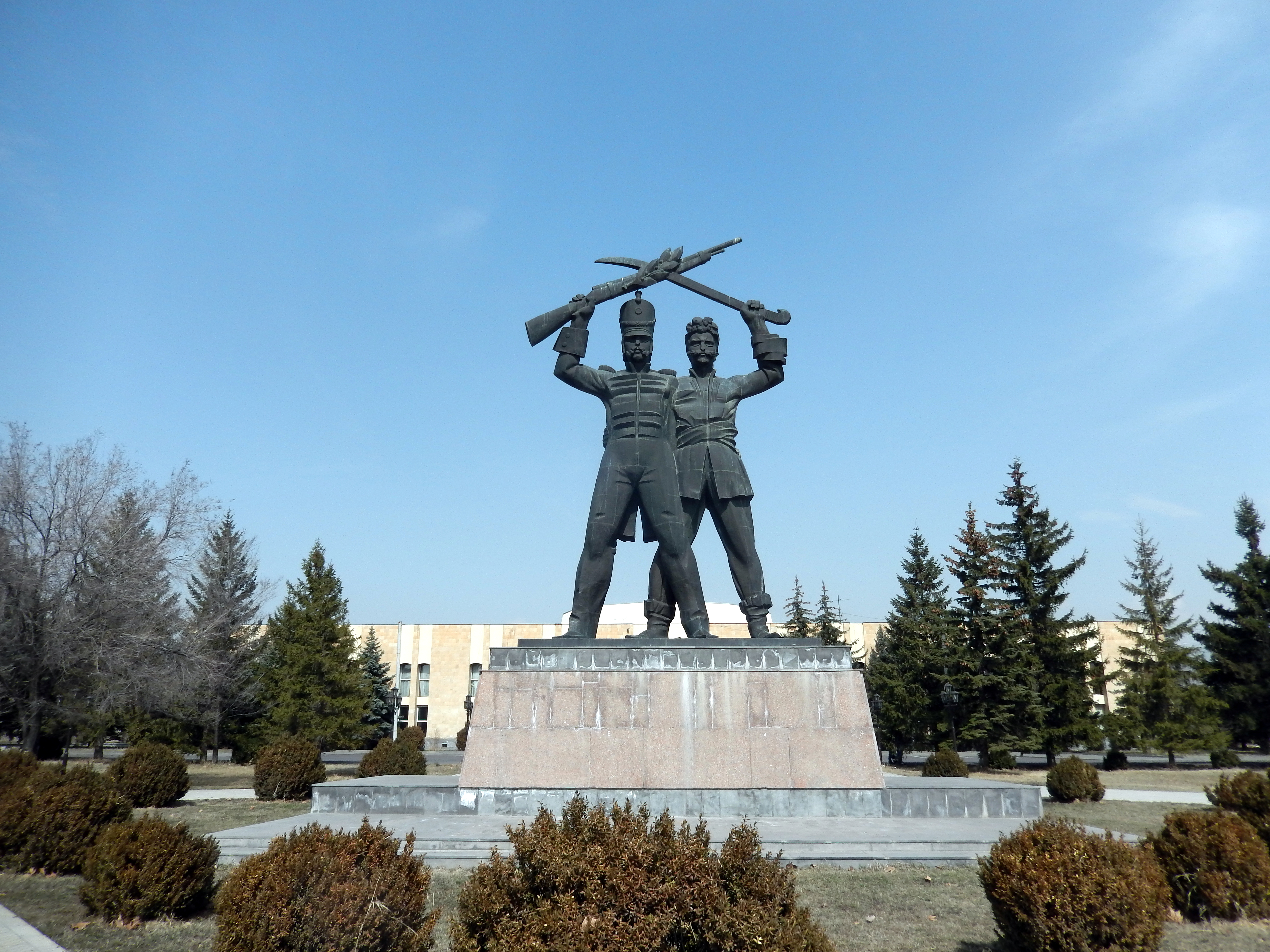 քանդակագործ` Սարգիս Բաղդասարյան ճարտարապետ` Ս. Բարխուդարյան 2/6